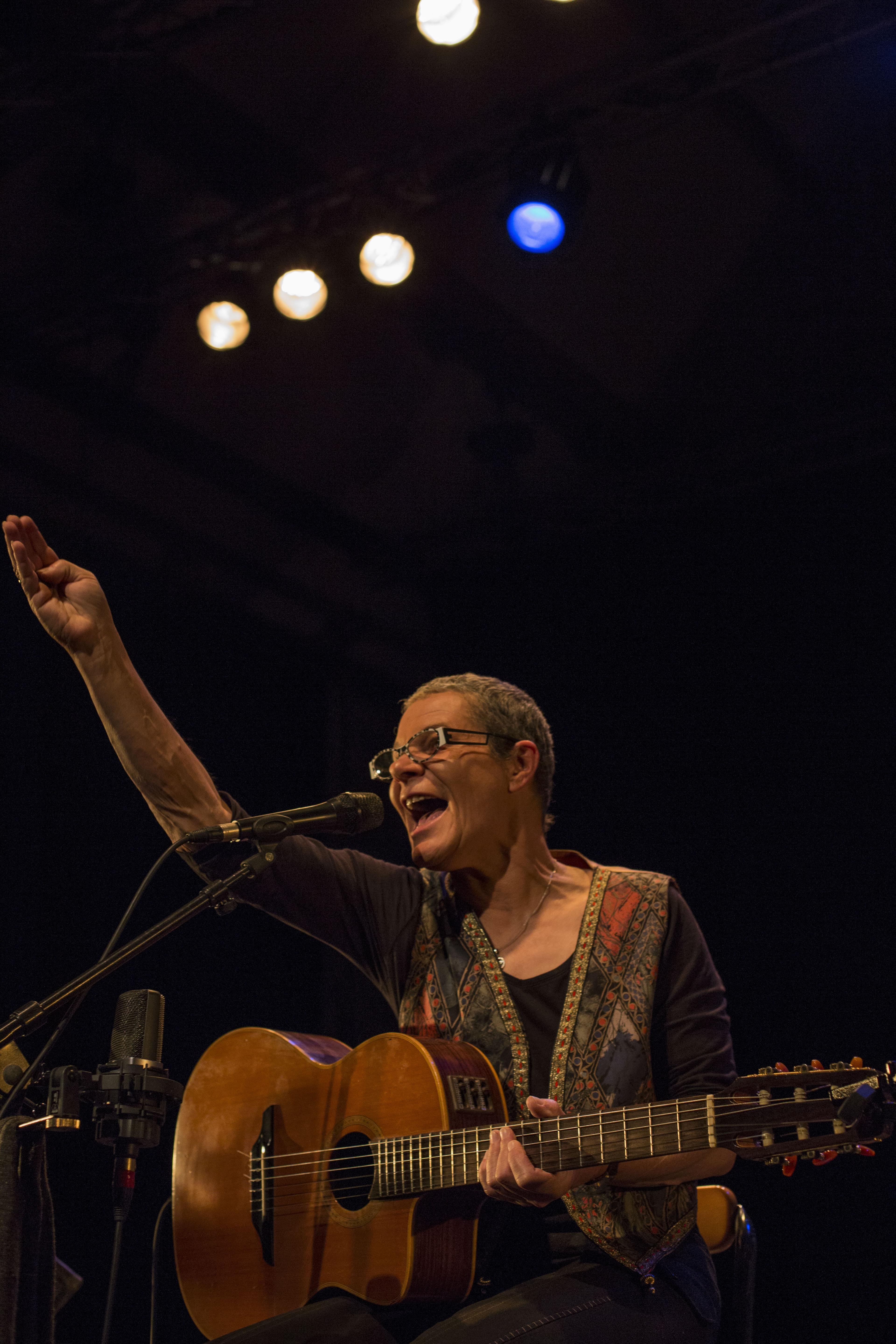 Catherine Fontaine en concert - spectacle quand les couleurs s'en mêlent à Sédières (19)